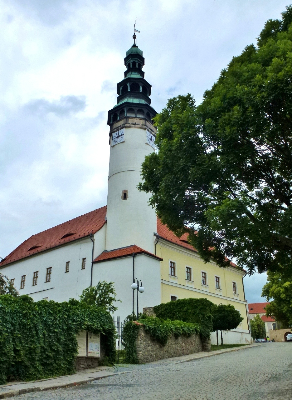 Chodský hrad (Domažlice), Chodské nám. 96, Domažlice